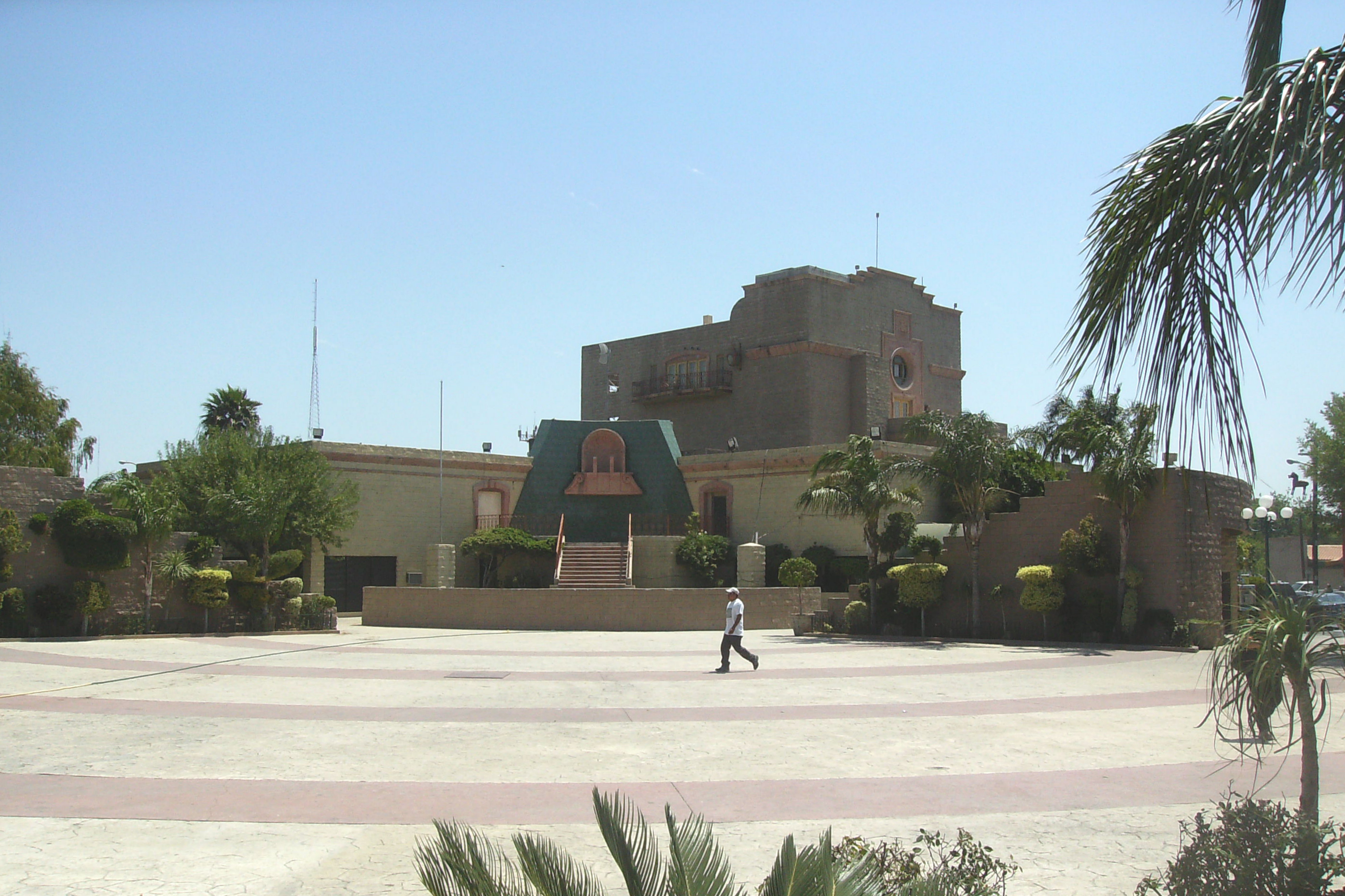 Nuevo Laredo Main Municipal Building